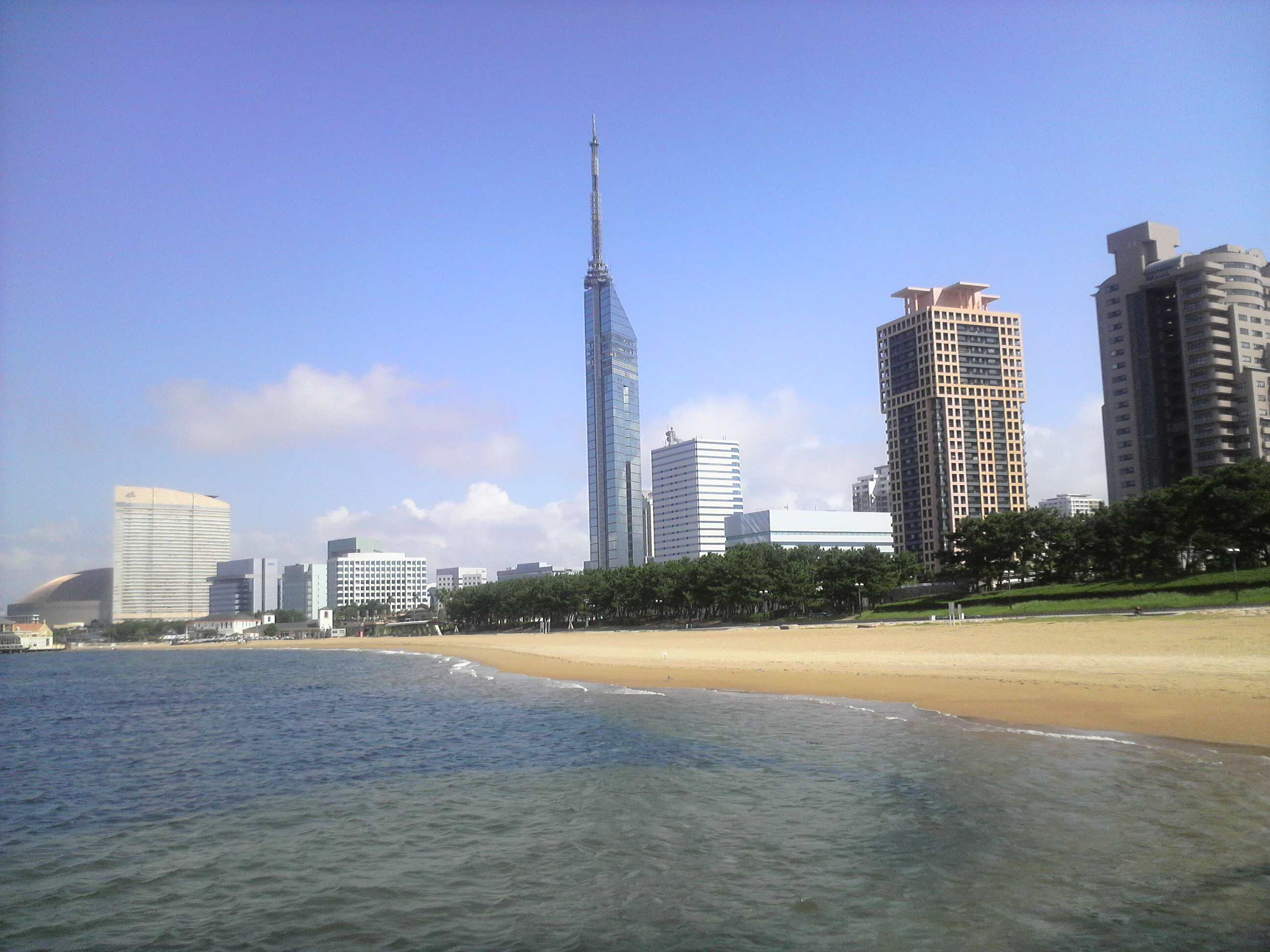 福岡市早良区百道浜のシーサイドももち海浜公園